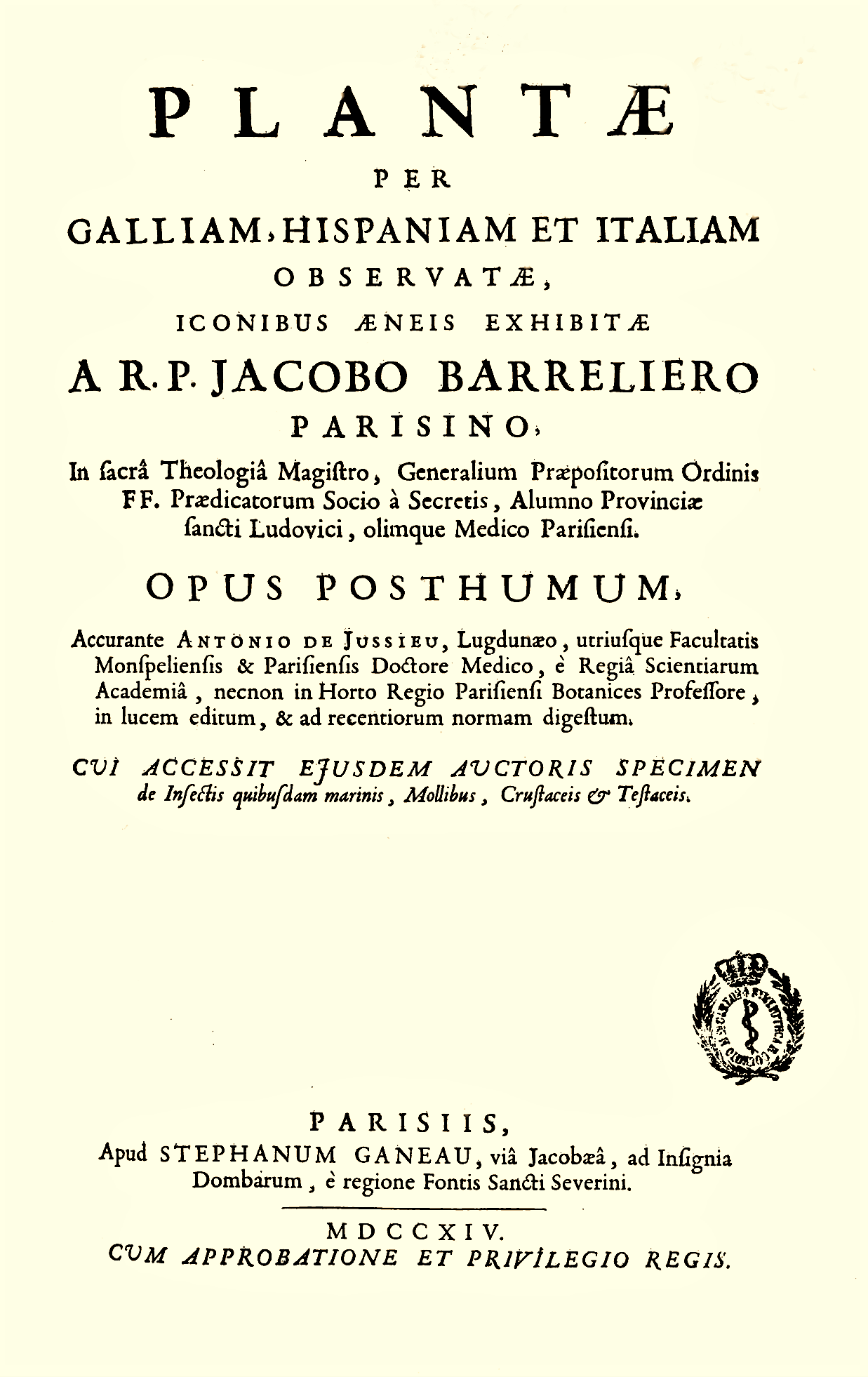 Jacques Barrelier, Antoine de Jussieu: Plantæ per Galliam, Hispaniam et aliam observatæ mit 334 Bildern, Verlag Stephan Ganeau, Paris 1714